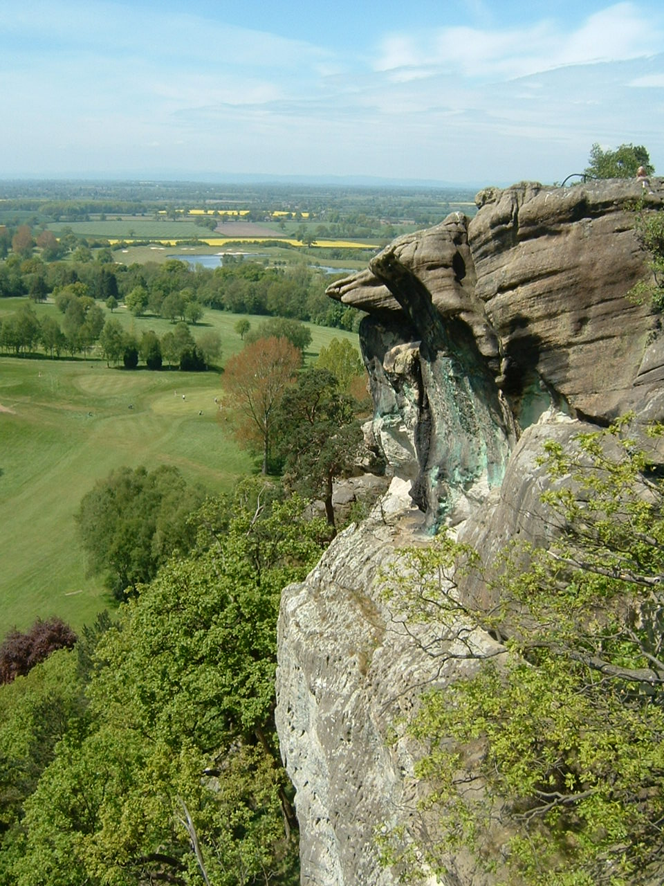 Hawkstone Park